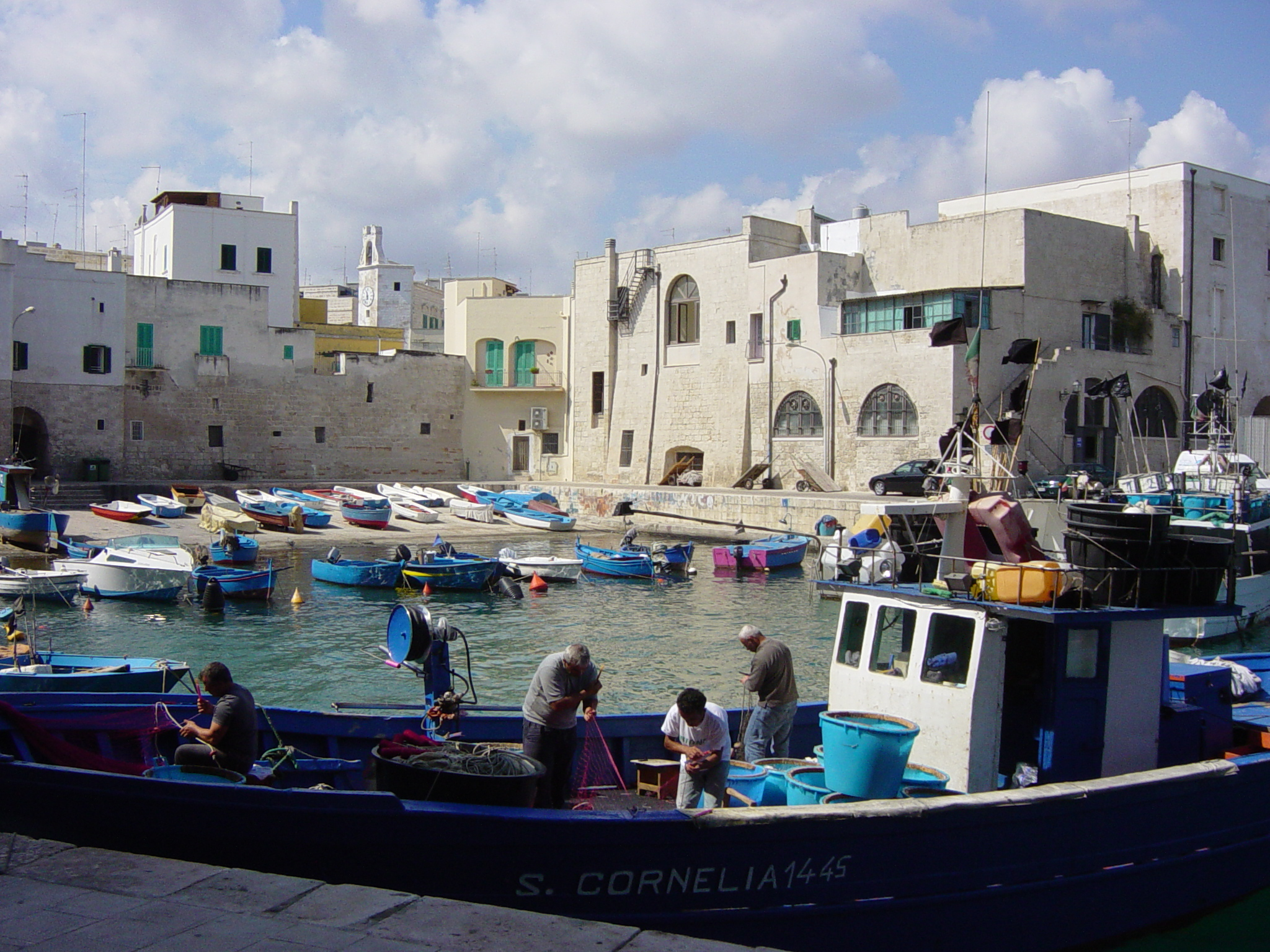 Port de Monopoli, prés de Polignano a Mare entre Bari et Brindisi